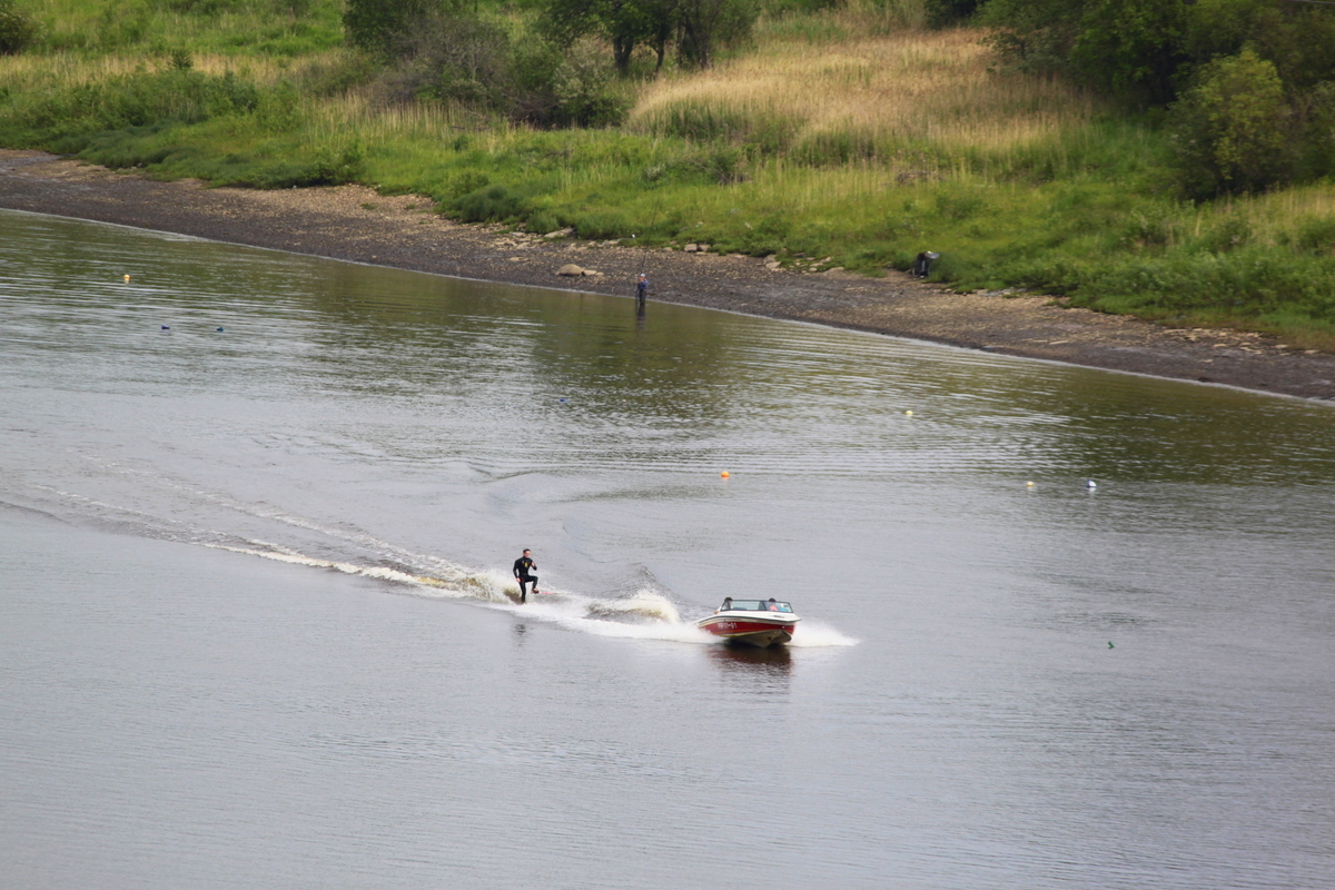 Тренировка